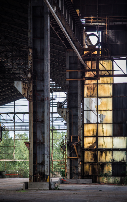 Comparto Unione area ex-Falck This is a photo of a monument which is part of cultural heritage of Italy.